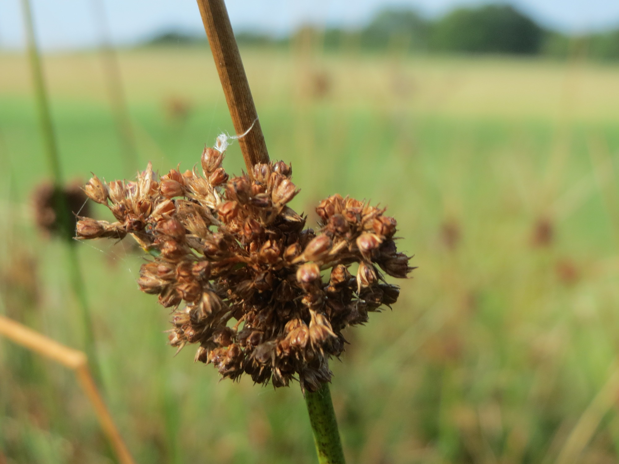 Knäuel-Binse (Juncus conglomeratus) im Naturschutzgebiet Mürmes